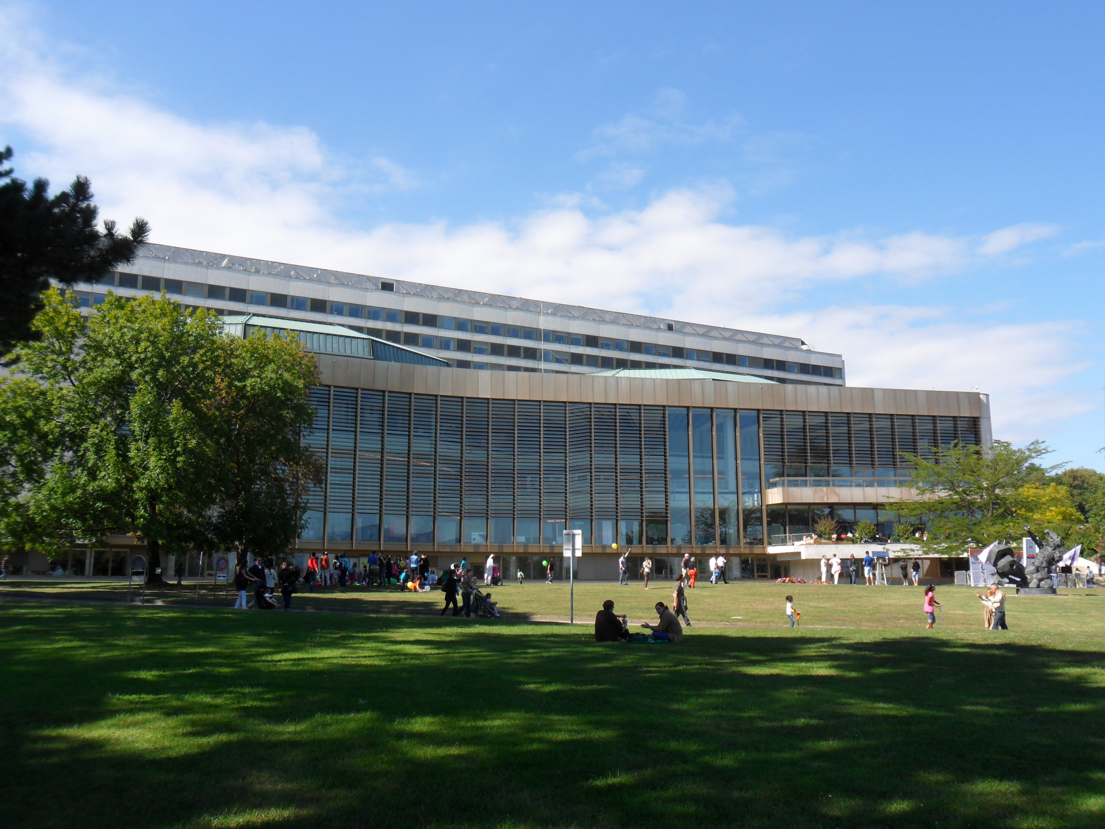 Vue générale du bâtiment E du Palais des Nations